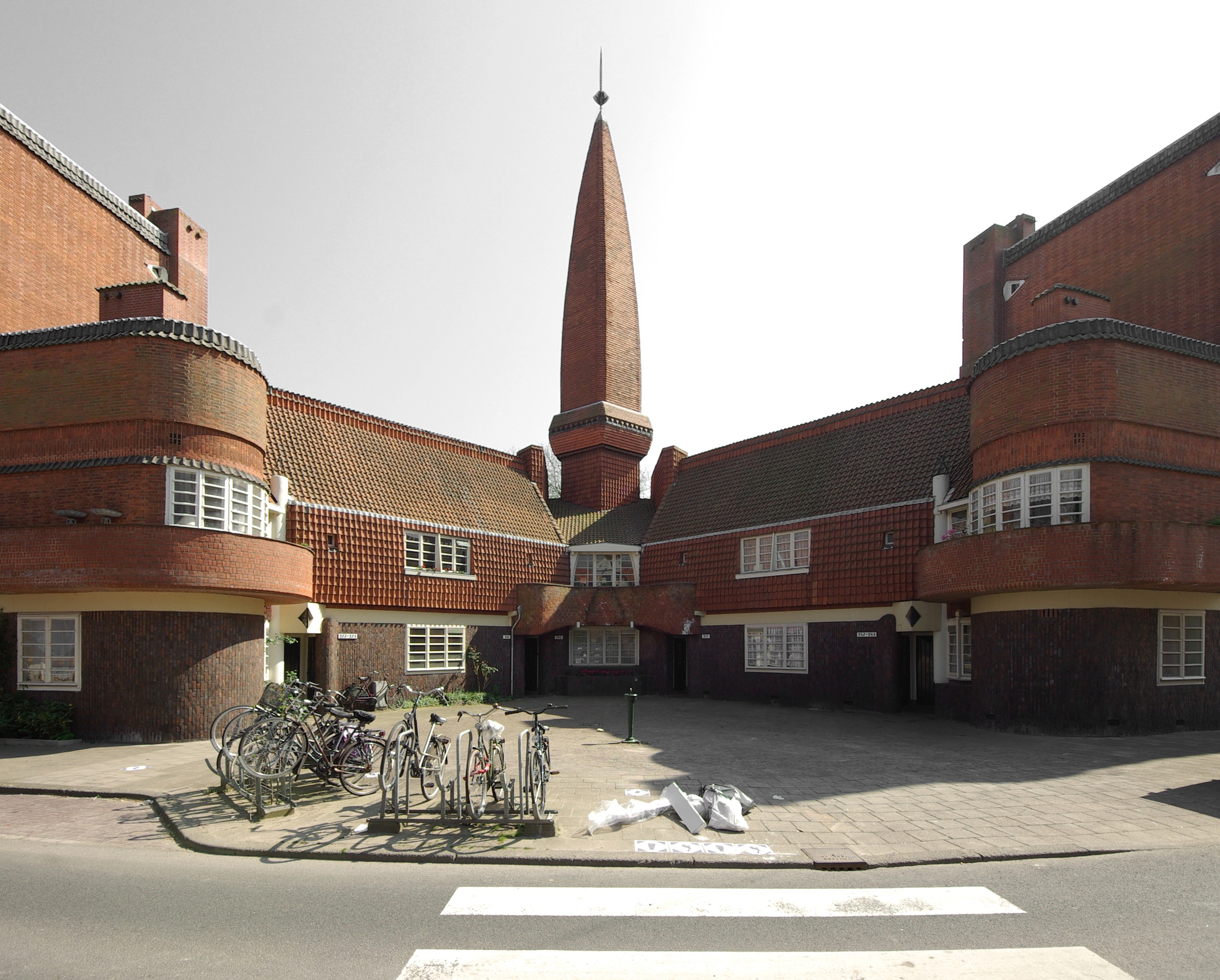 Gebouw Het Schip in Amsterdam 8″ N, 4° 52′ 27.06″ E